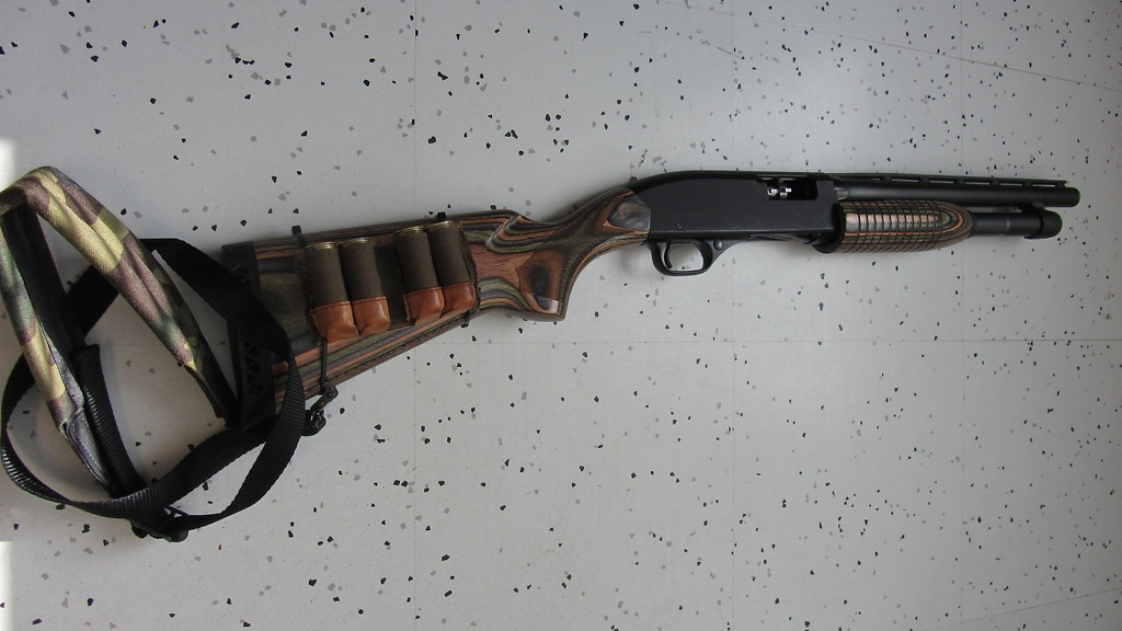 Pumppuhaulikko, jonka alkuperäistä rakennetta on muutettu piippua lyhentämällä. 12/70 cal.